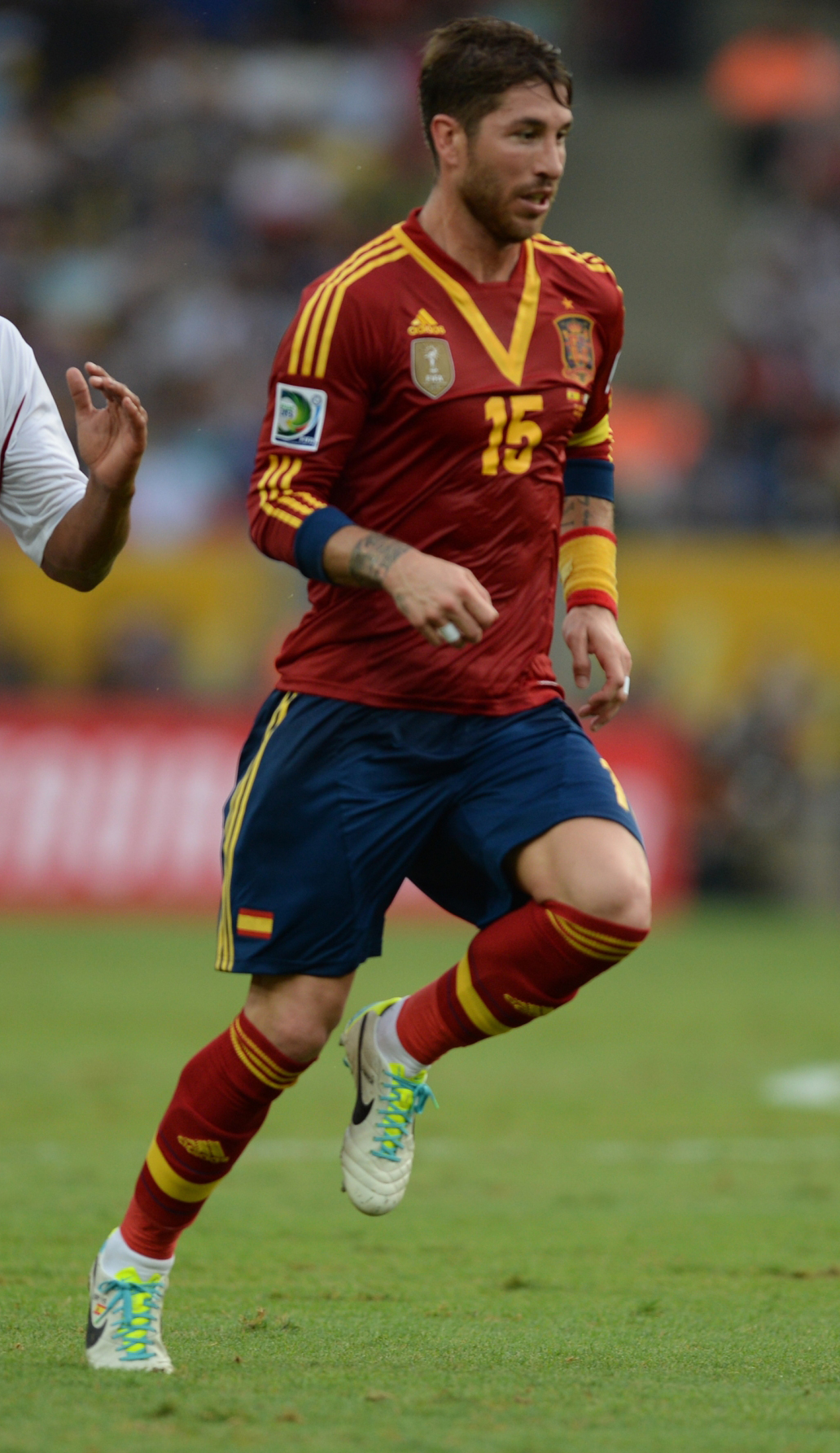 Sergio Ramos Confederations Cup 2013 (cropped)